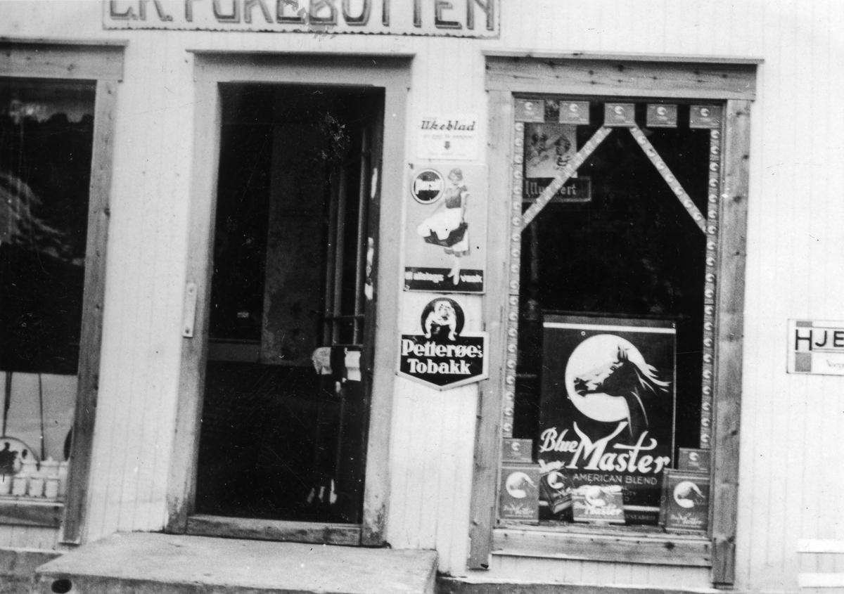 Store L. K. Furebotten in Drageid, Saltdal, Norway.